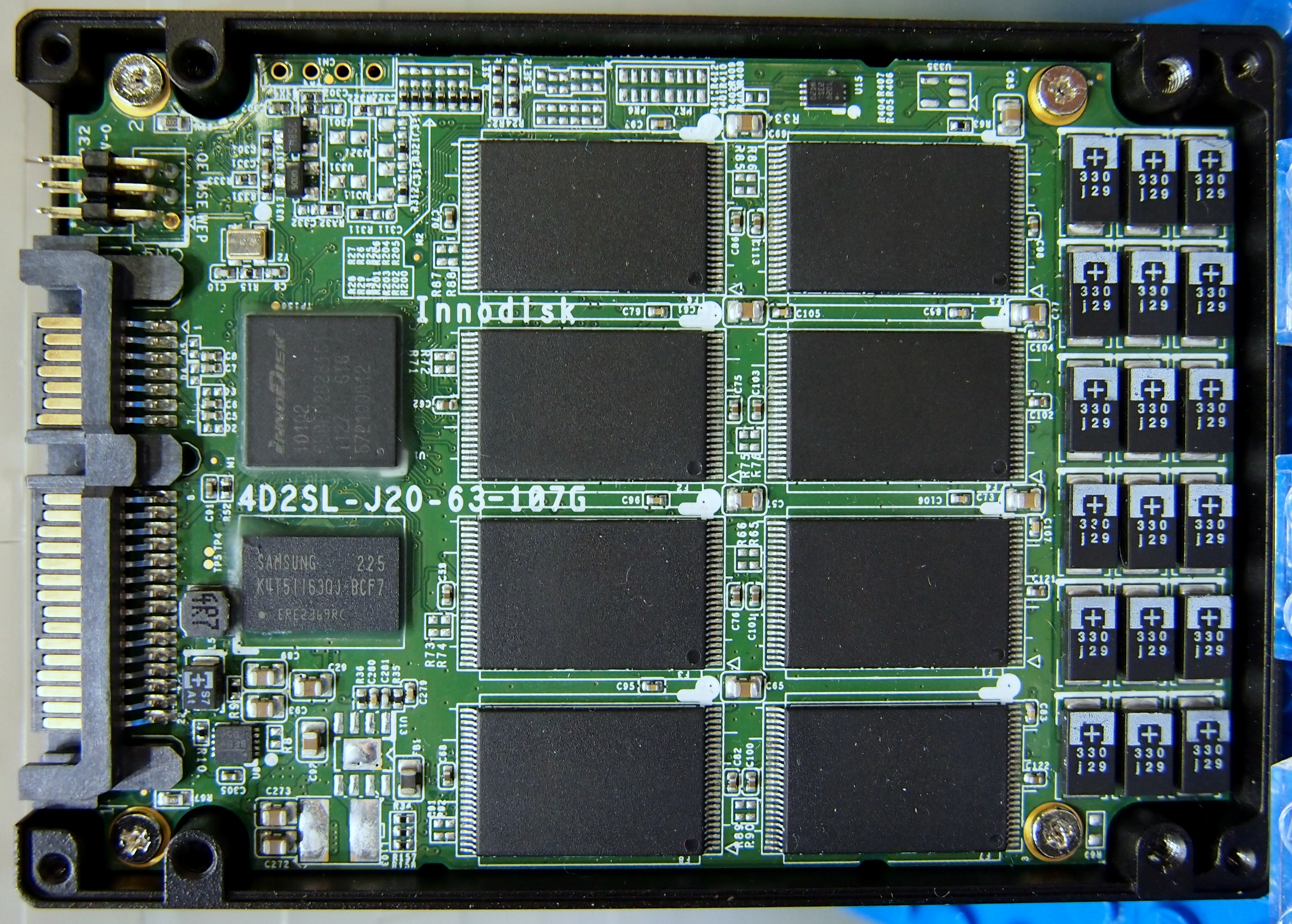 Embedded World 2014: Innenleben eines Innodisk-Industrial SSD-Laufwerk